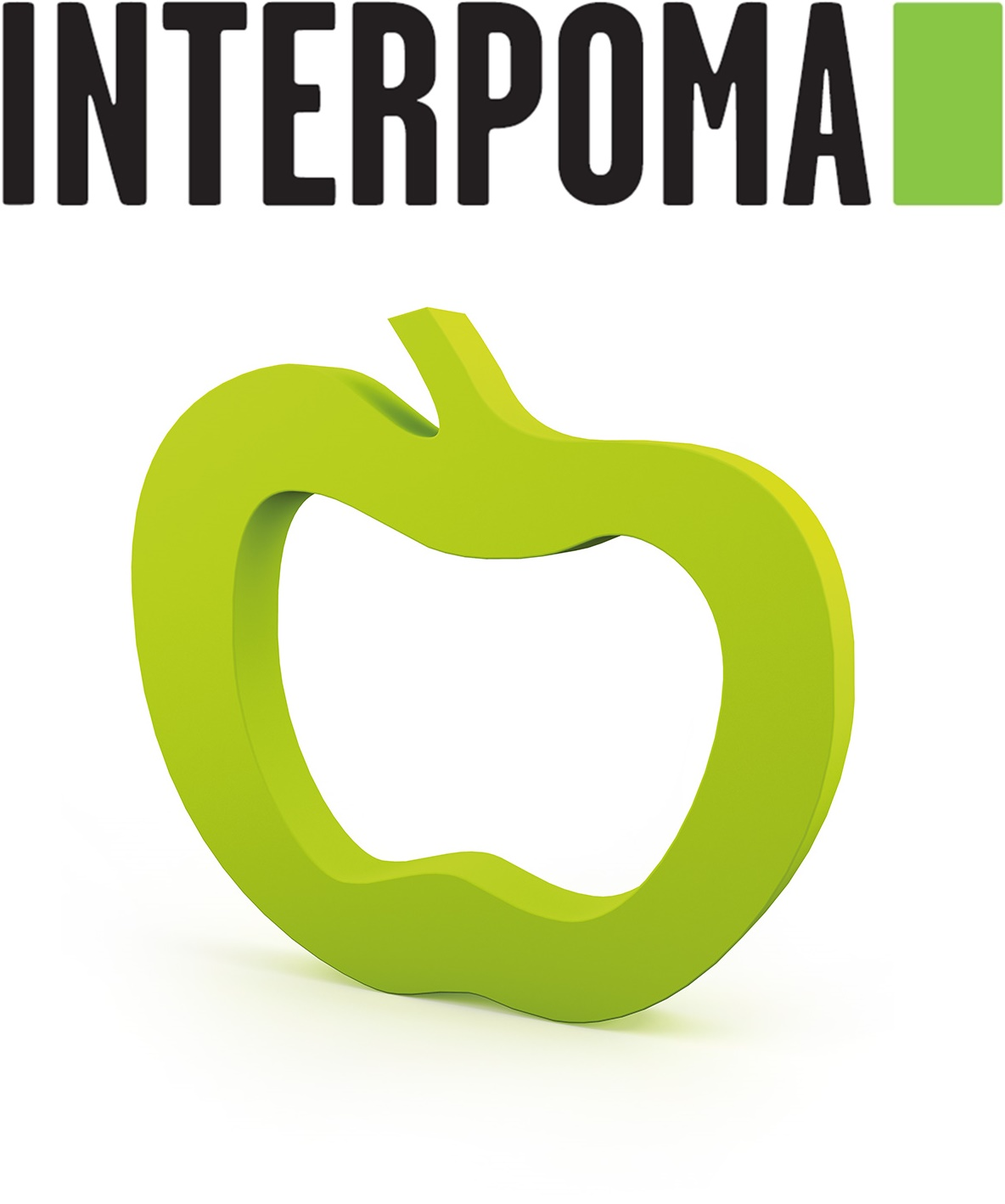 Das neue Logo der Interpoma